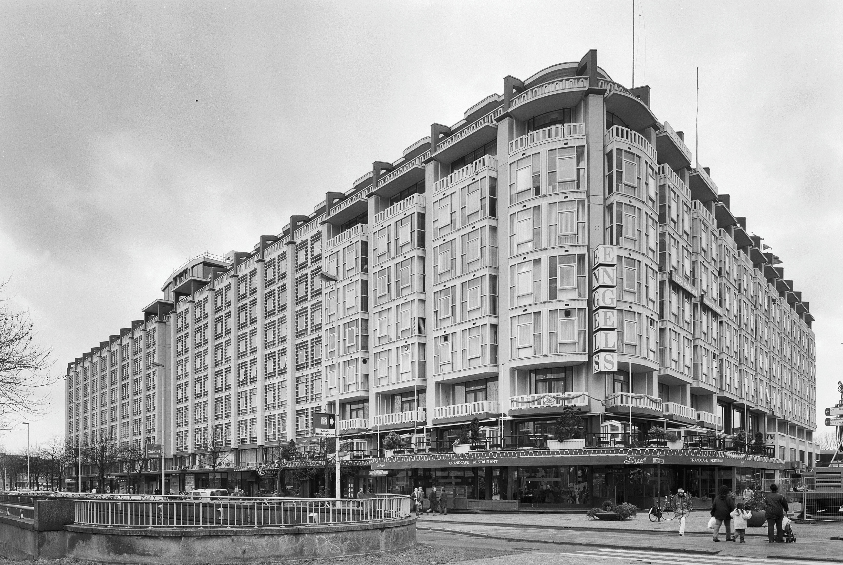 Groothandelsgebouw: Overzicht hoek Stationsplein / Weena